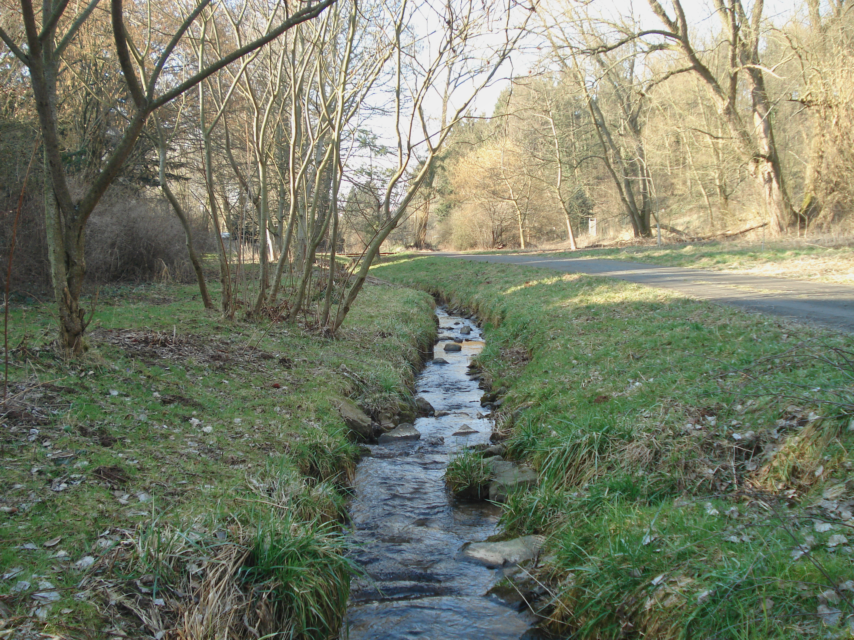 Der Neuwiesenbach bei Alzenau